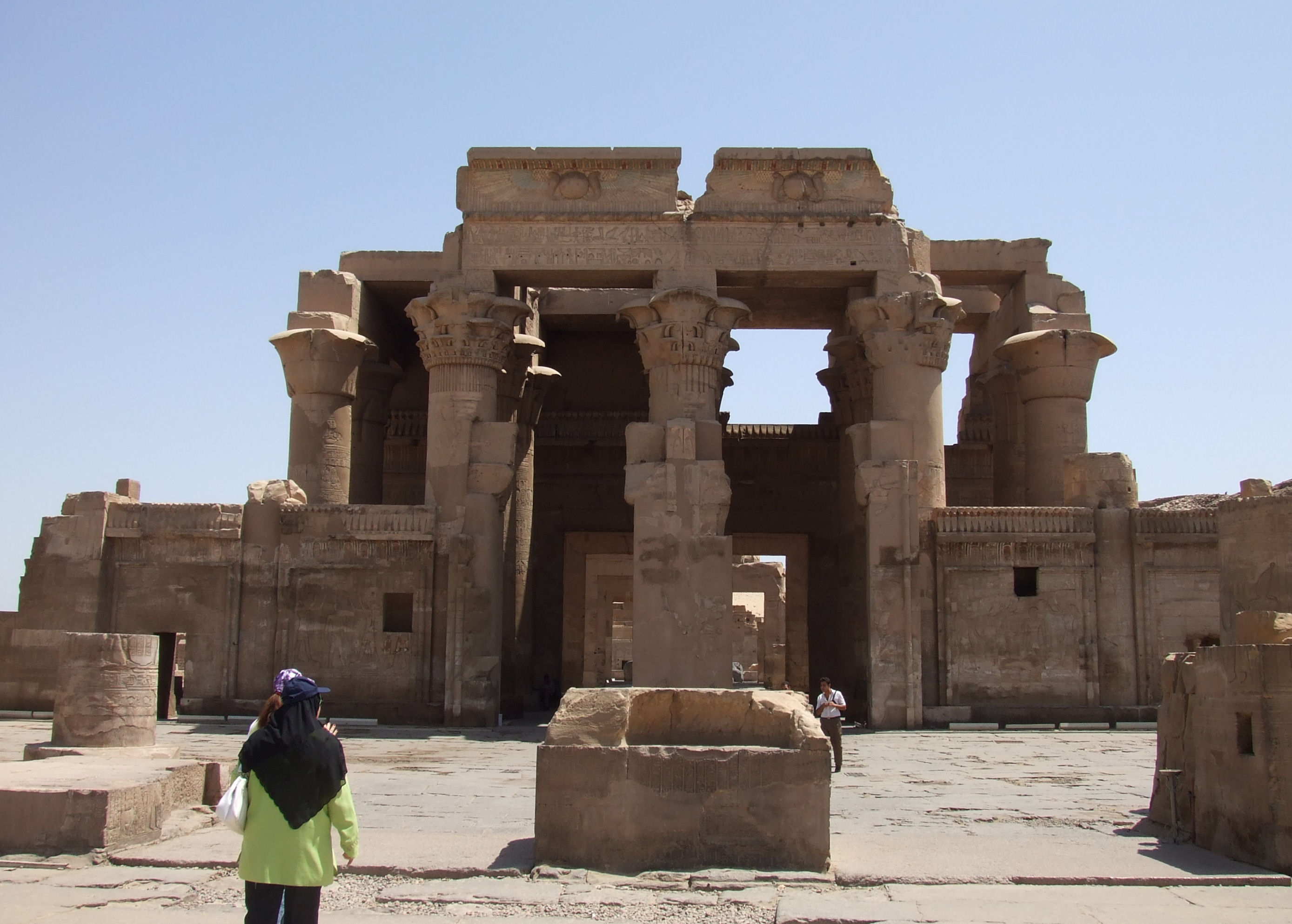 Kom Ombo temple, Egypt